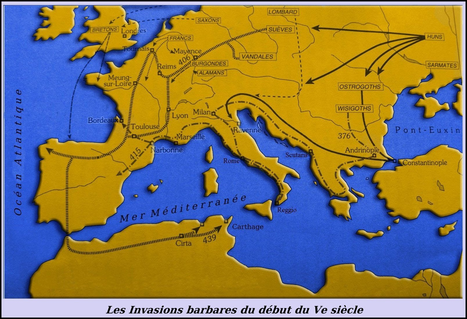 Carte des grandes invasions barbares du Ve siècle en Europe